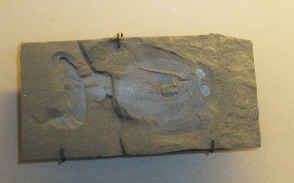 Fossil of Odaraia, an extinct arthropod Took the photo at Musee d'Histoire Naturelle, Brussels